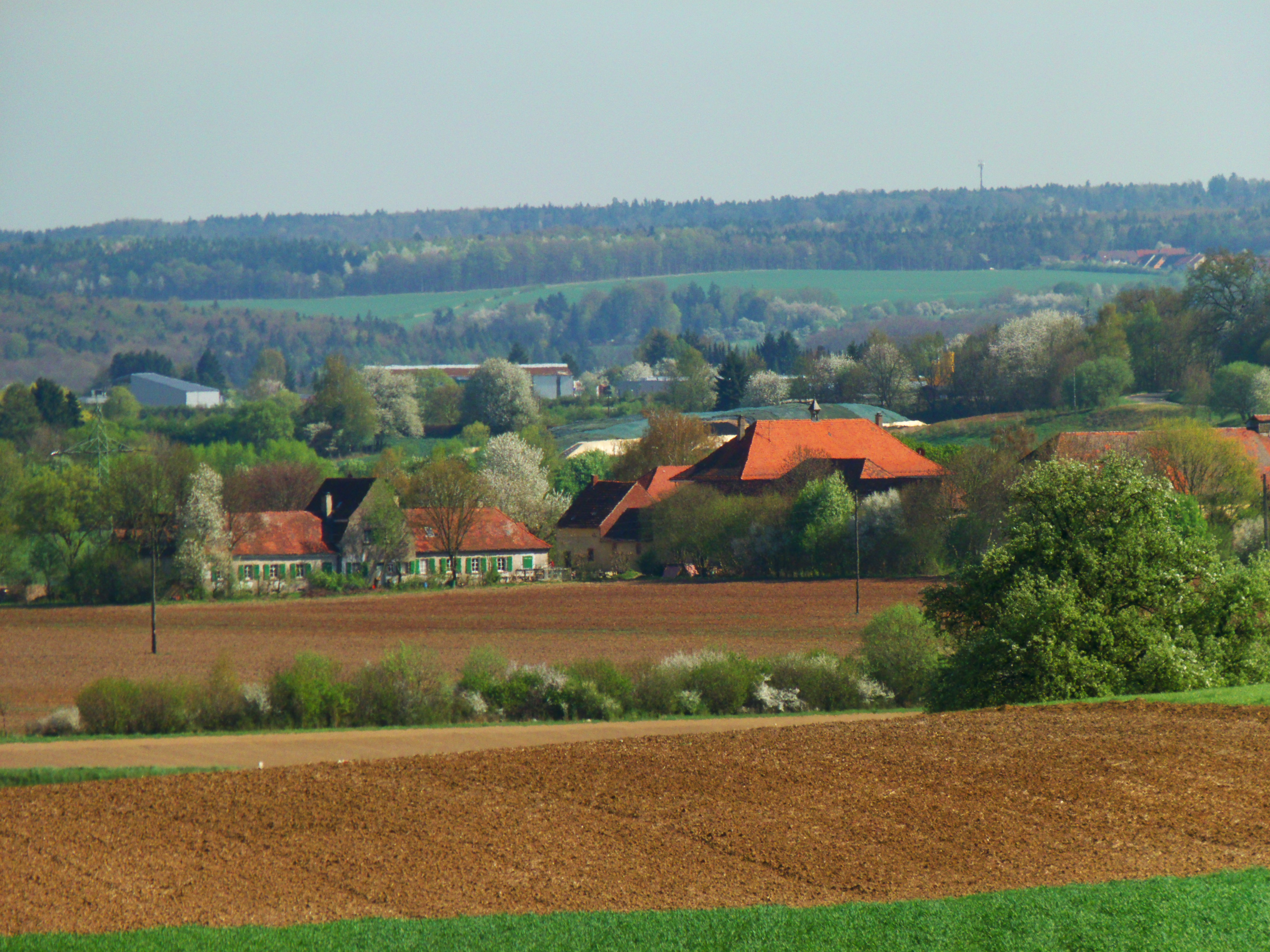 Katharinentalerhof